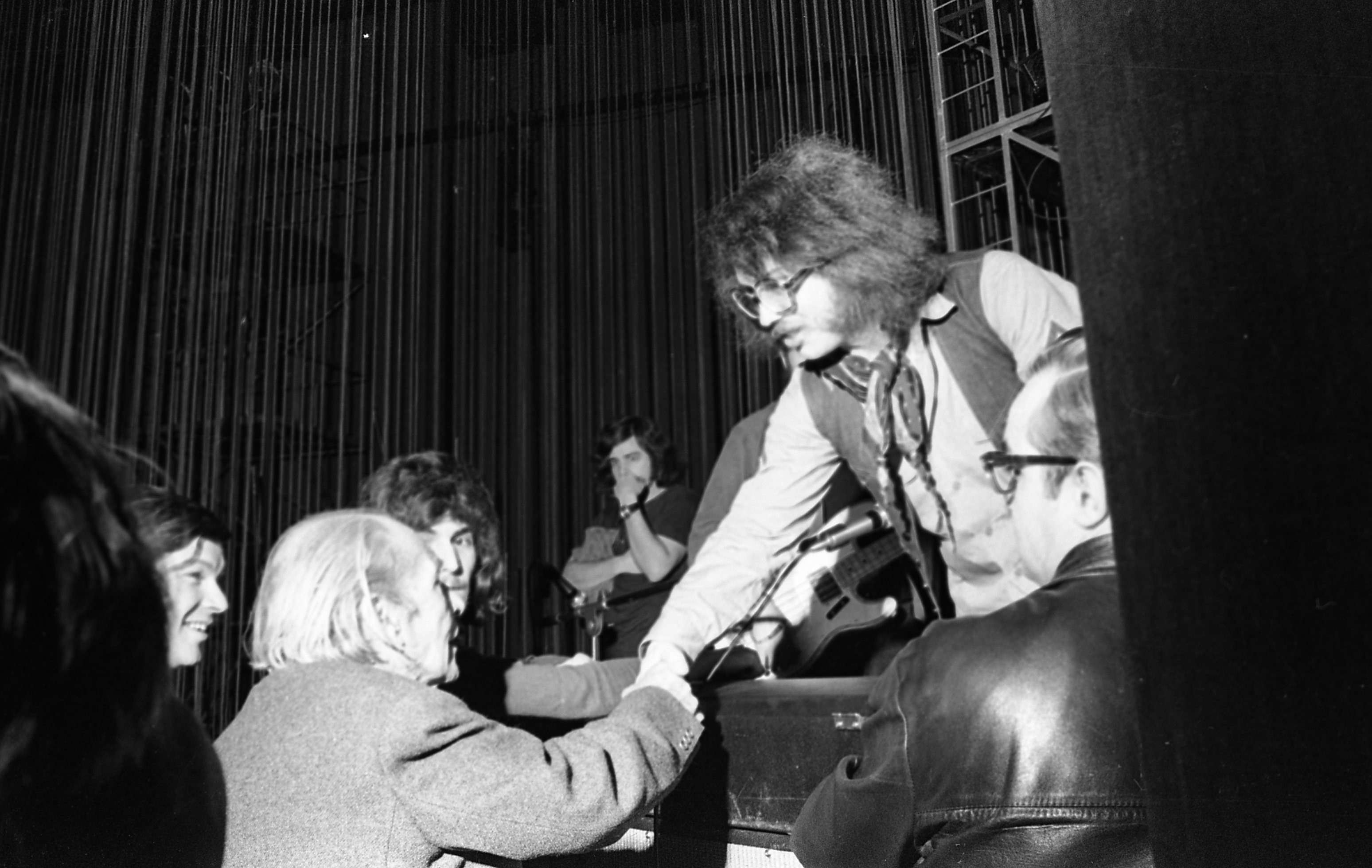 Vígszínház, a Képzelt riport egy amerikai popfesztiválról című musical előadásán Déry Tibor író és Presser Gábor zeneszerző kézfogása. Mögöttük Marton László rendező, Barta Tamás és Somló Tamás zenészek.